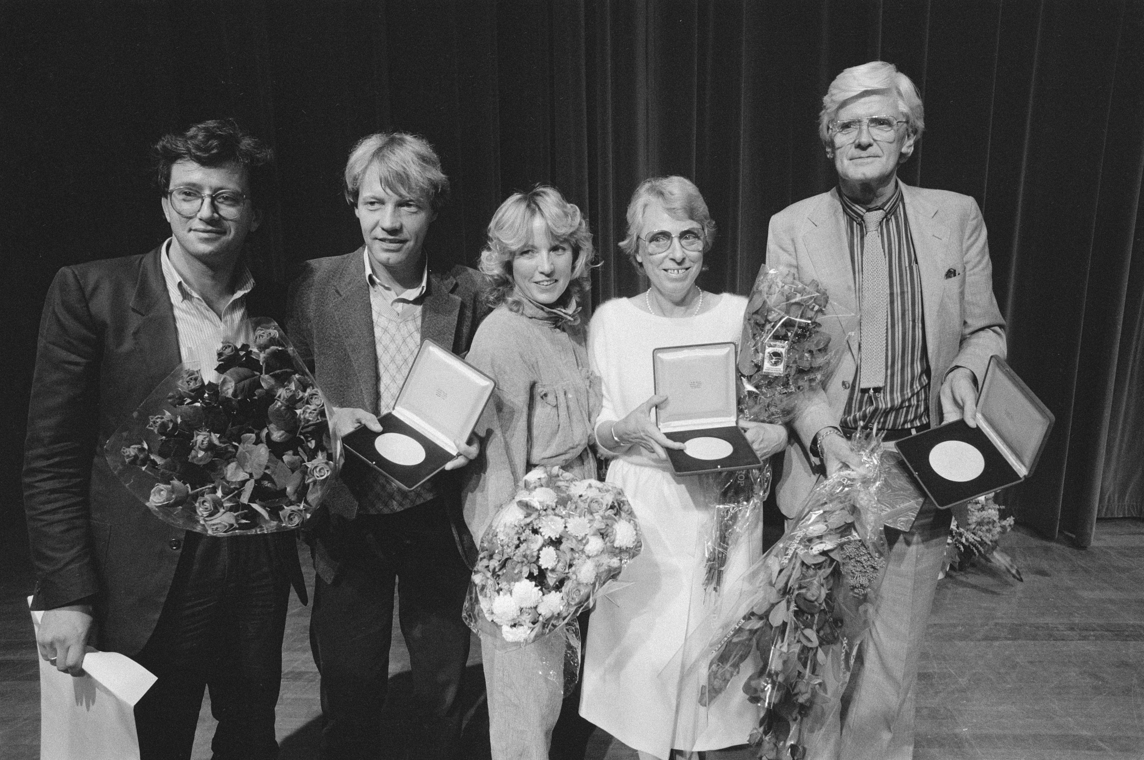 Uitreiking Nipkowschijf en Reissmicrofoon; v.l.n.r. XXXX (Ludi Boeken?), Paul Witteman, Ria Bremer (tv-programma), Trees te Nuyl (programma-adviseur) en Gabri de Wagt (radio). Ria Bremer krijgt een eervolle vermelding voor het AVRO-programma Vinger aan de Pols